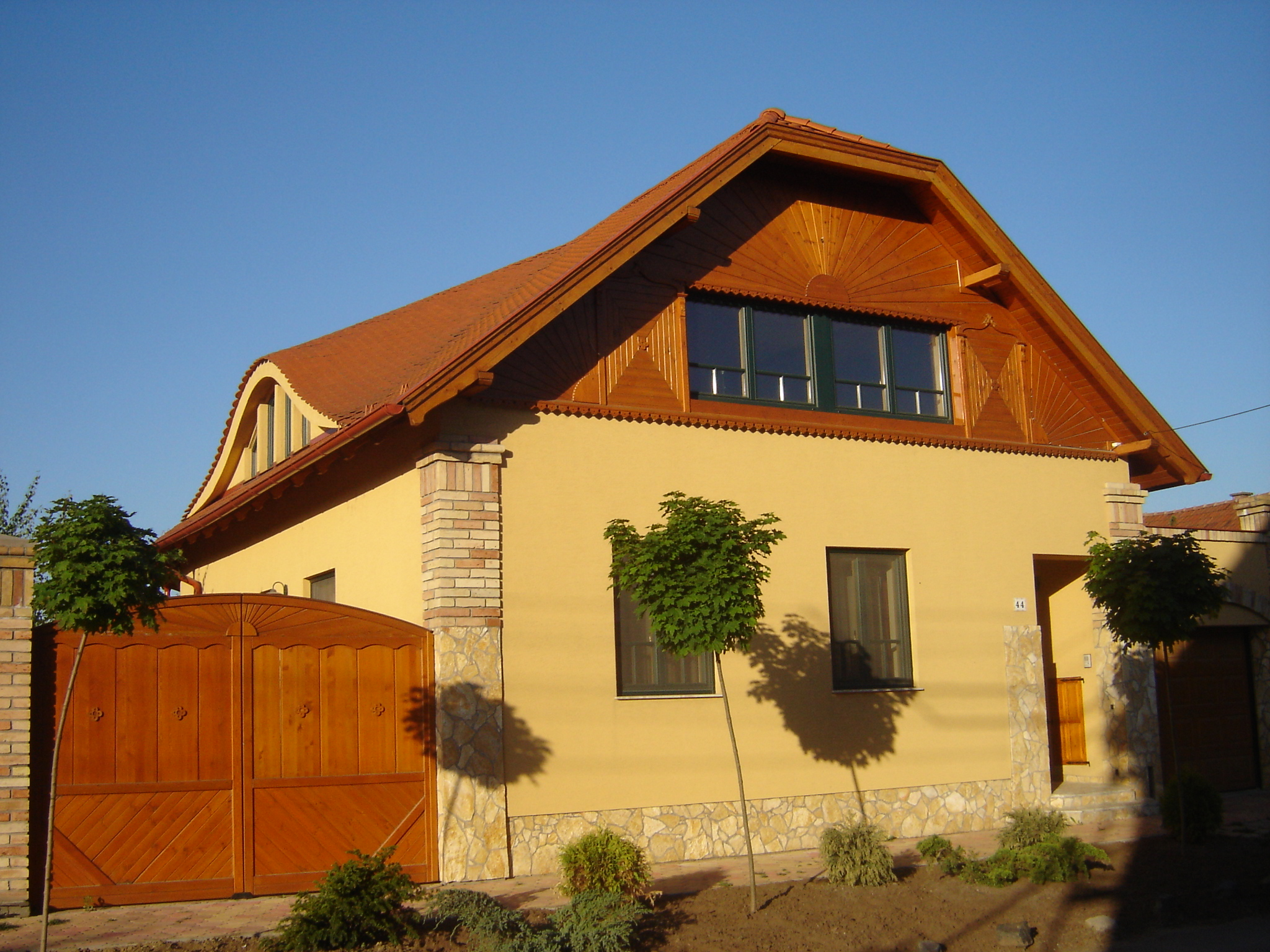 Új napsugaras ház, Szeged-Alsóváros, Szabadsajtó utca